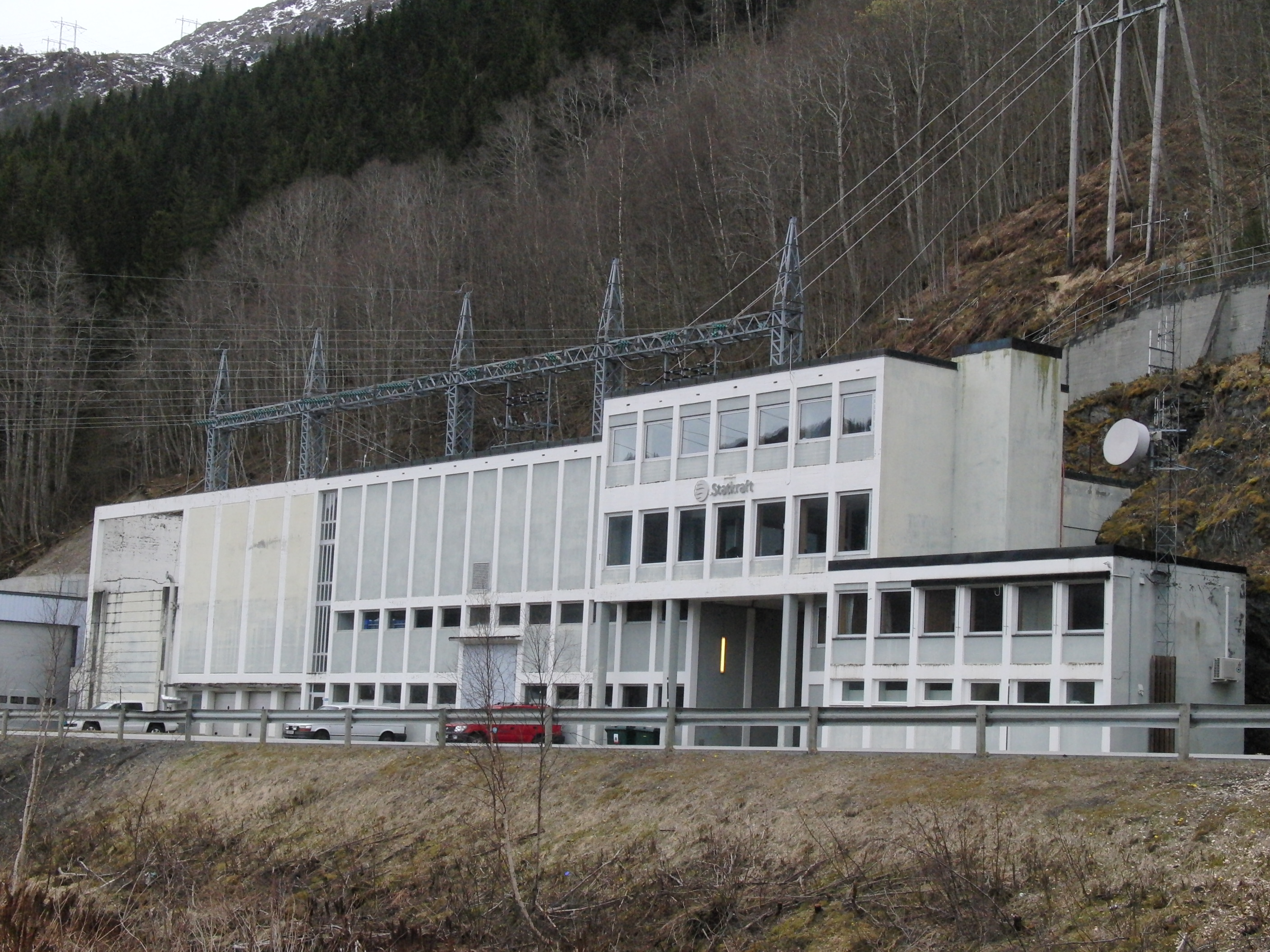 Trollheim kraftverk